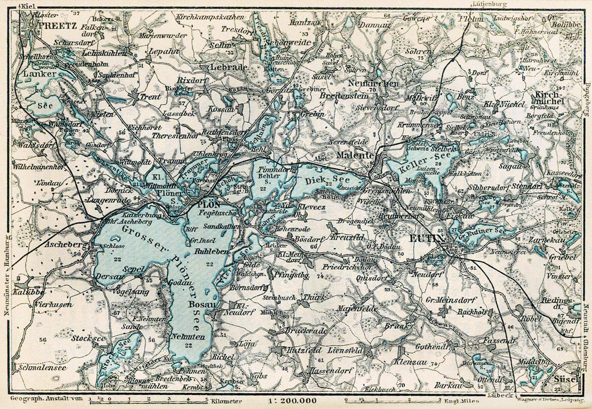 Die Holsteinische Schweiz ("Holstein Switzerland") um 1910